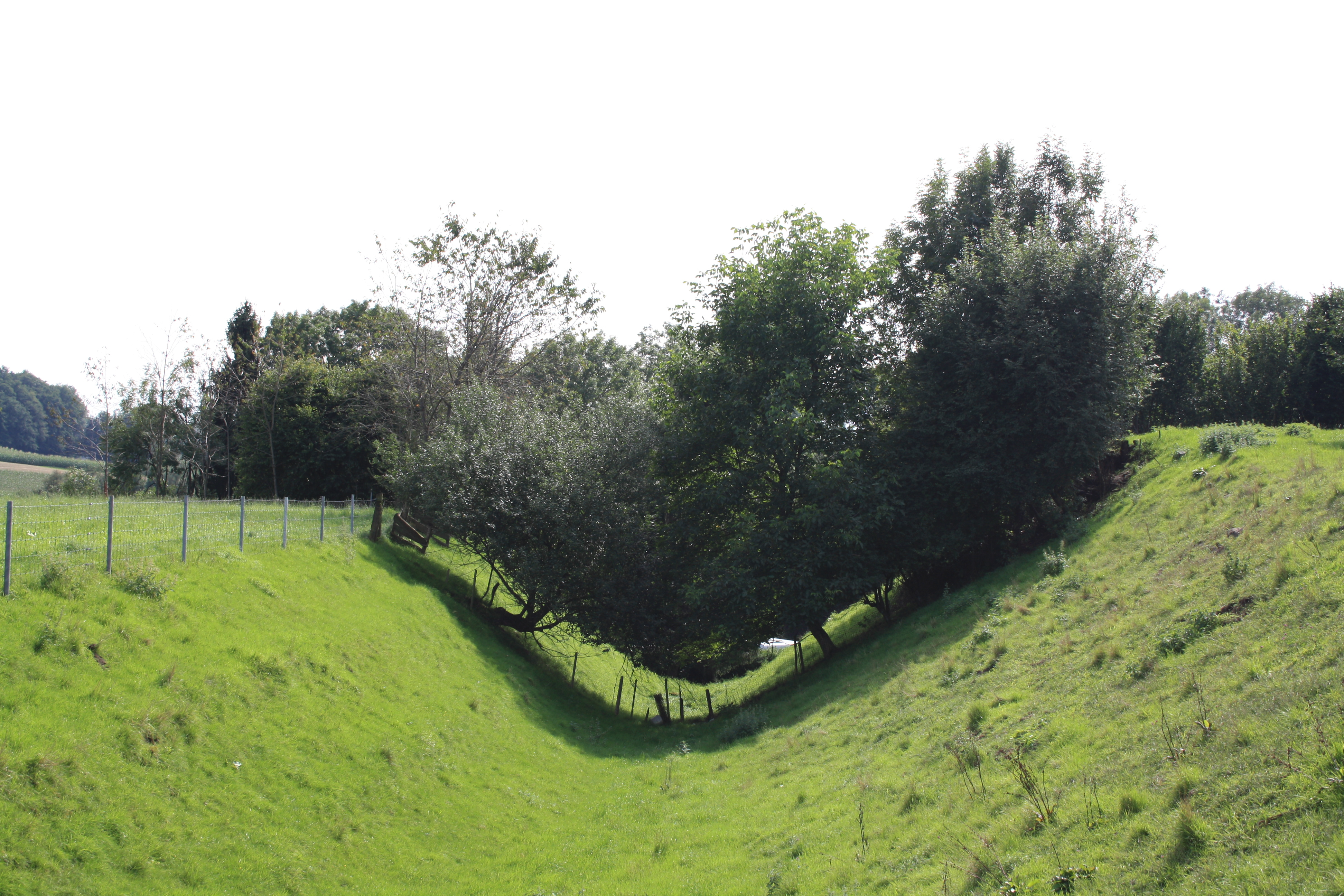 Der ehemalige Stadtgraben der Stadtbefestigung von Meienberg (links war die Stadtmauer), Sins, Aargau, Schweiz